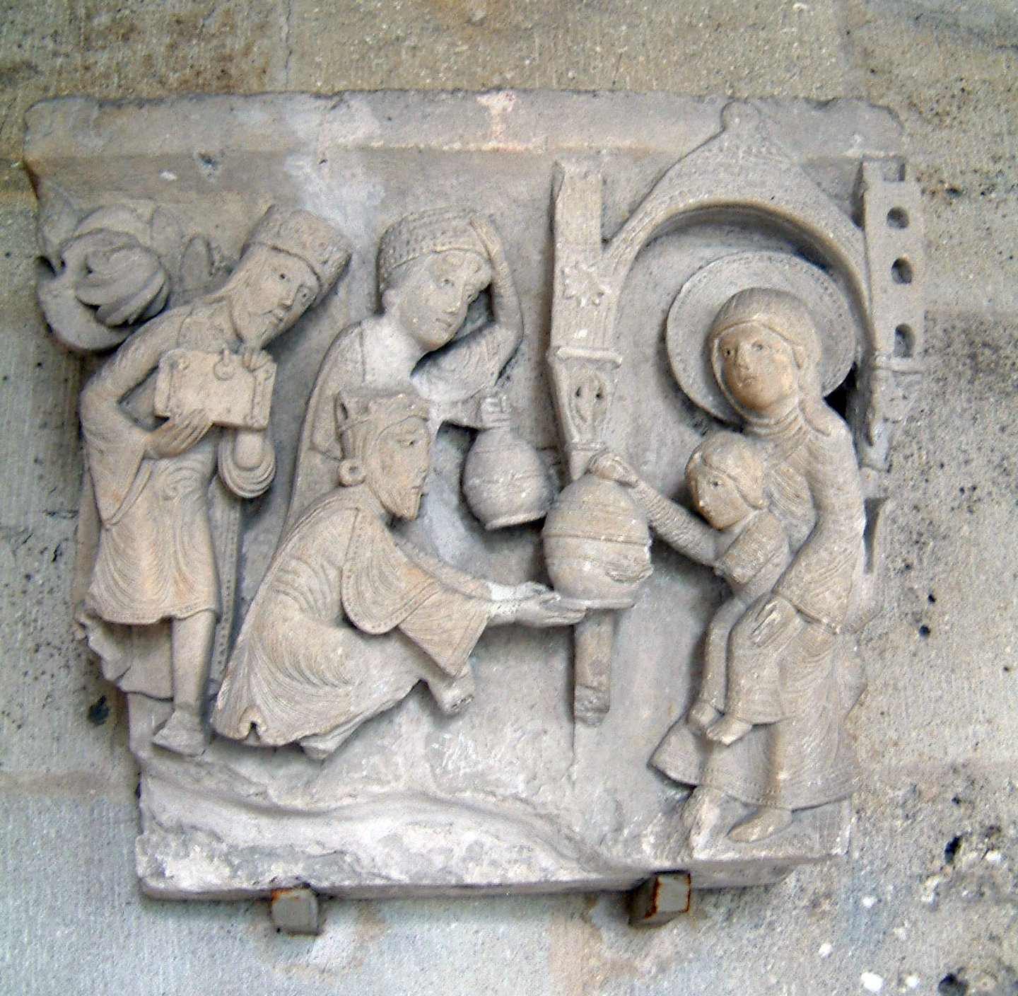 "L'adoration des mages", chapiteau, salle capitulaire, Cathédrale Saint-Lazare d'Autun, Autun, Bourgogne, FRANCE : L'adoration des mages.